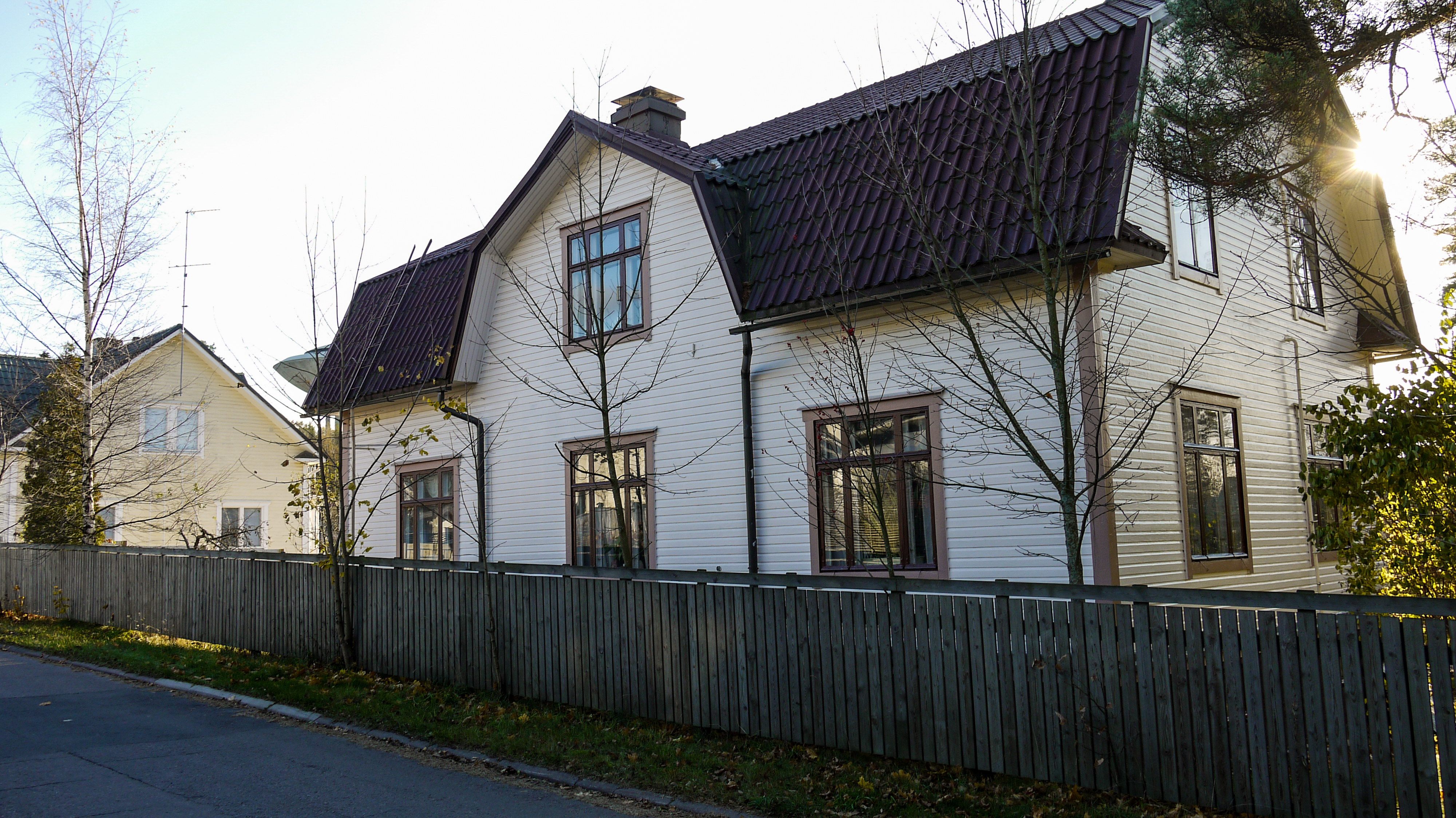 1935 valmistunut omakotitalo Haukilahden Taimentiellä. (valmistumisvuoden lähde: [1], rakennustunnus 04941500010185002)